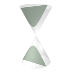 Imagem importada da wikipedia